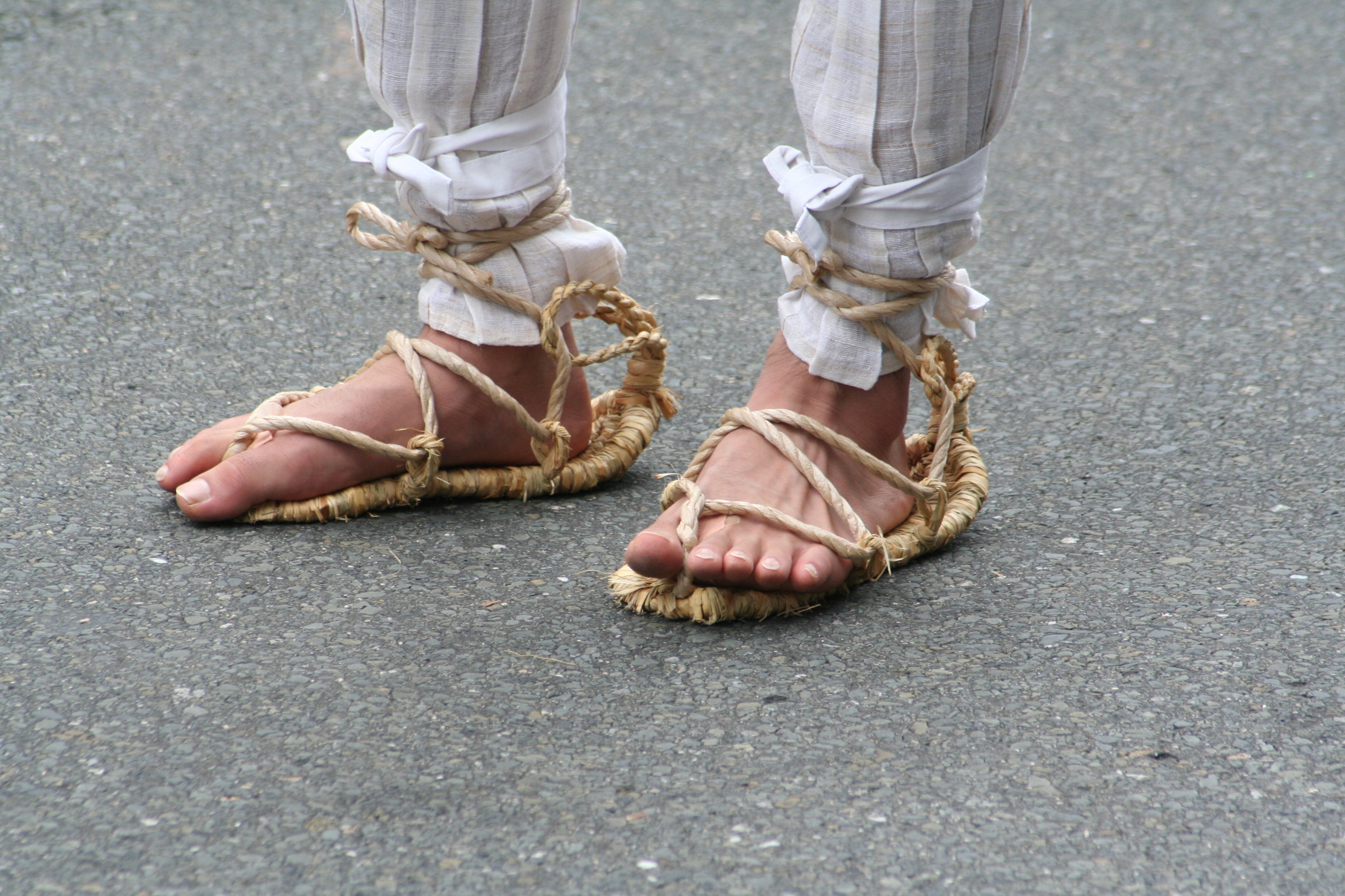 2009年7月17日に京都市で行なわれた祇園祭山鉾巡行の様子。 わらじ。